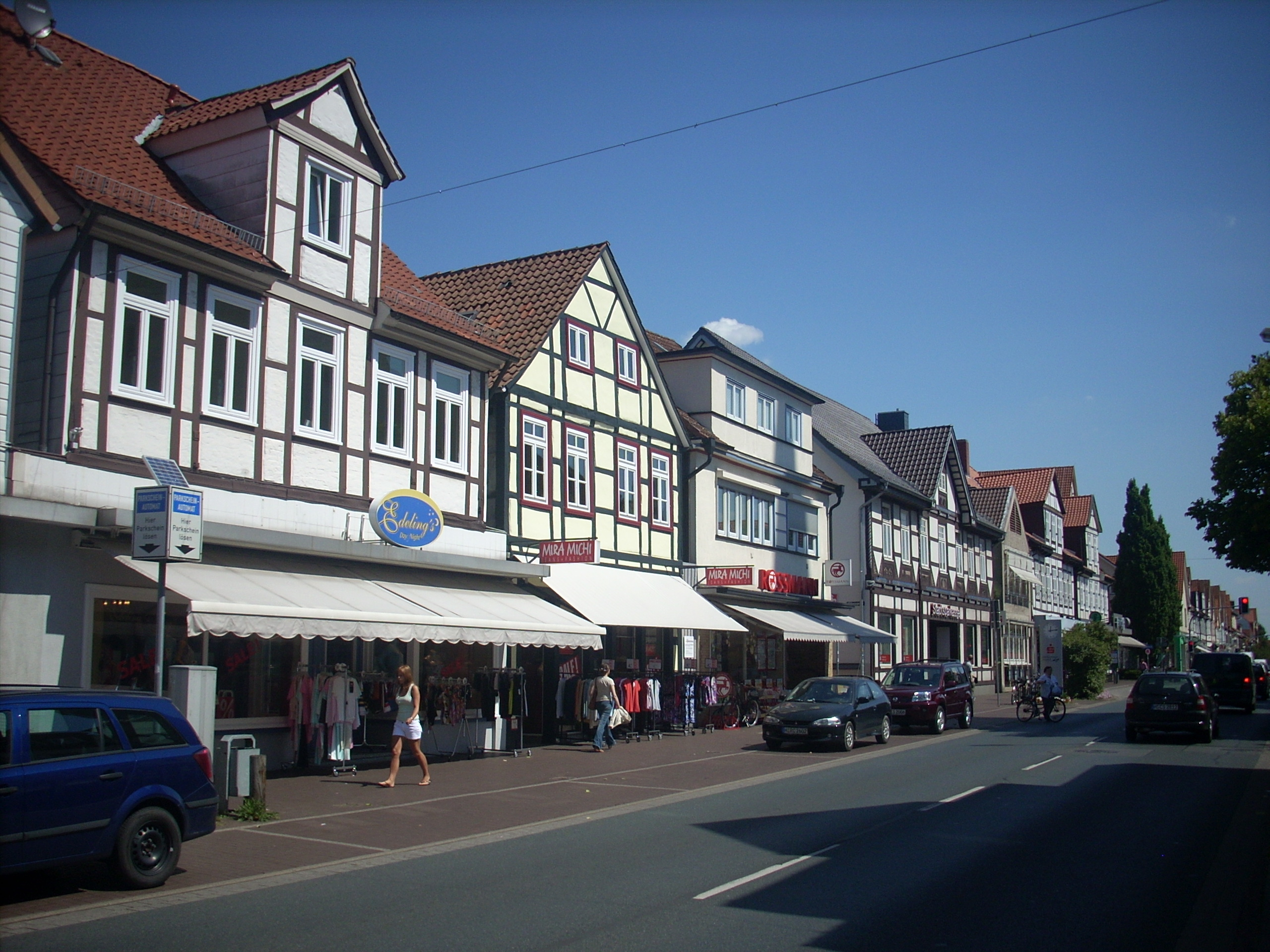 Burgdorf (Region Hannover), Häuser an der Marktstraße